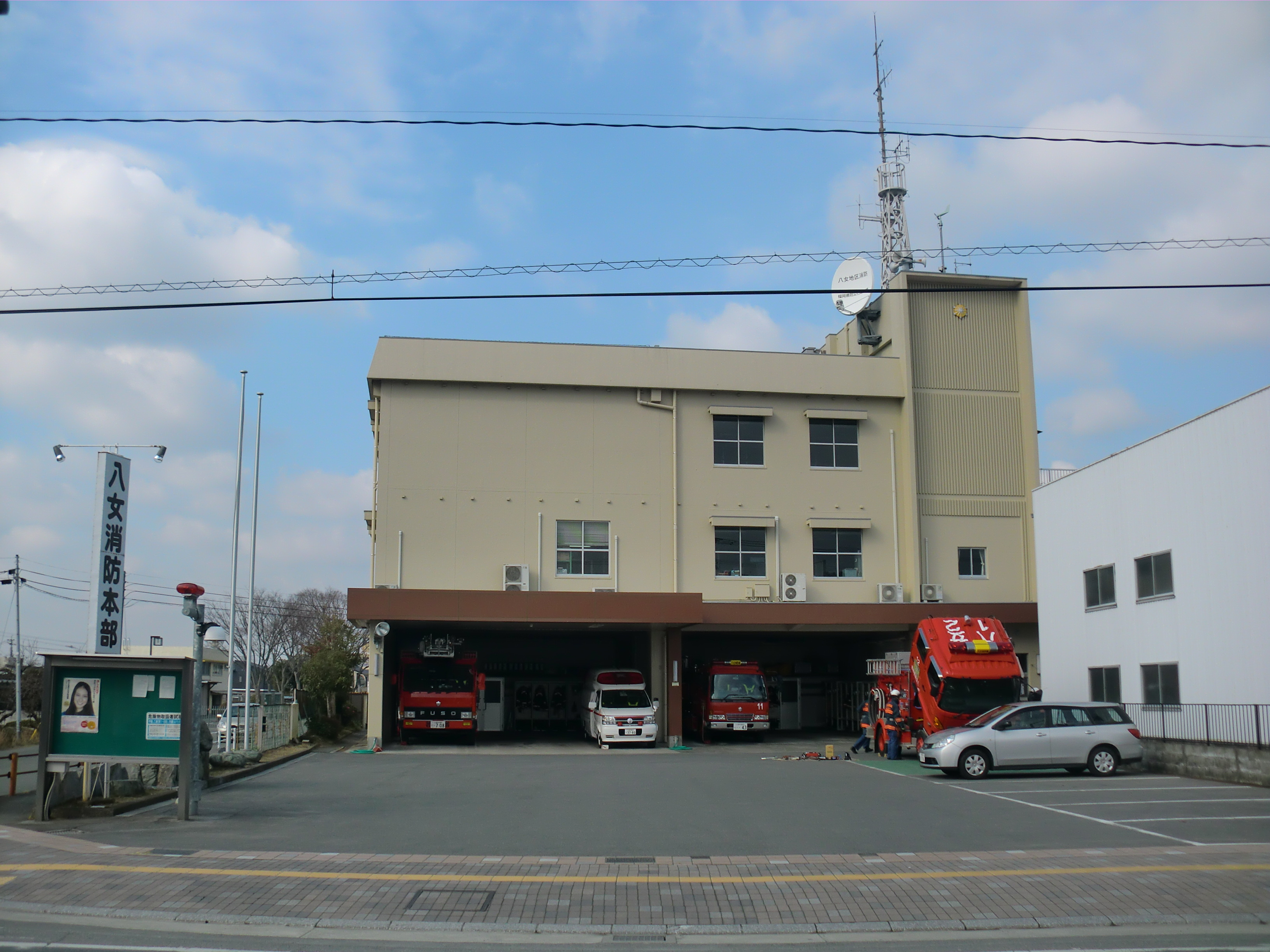 福岡県八女市にある八女（やめ）消防署